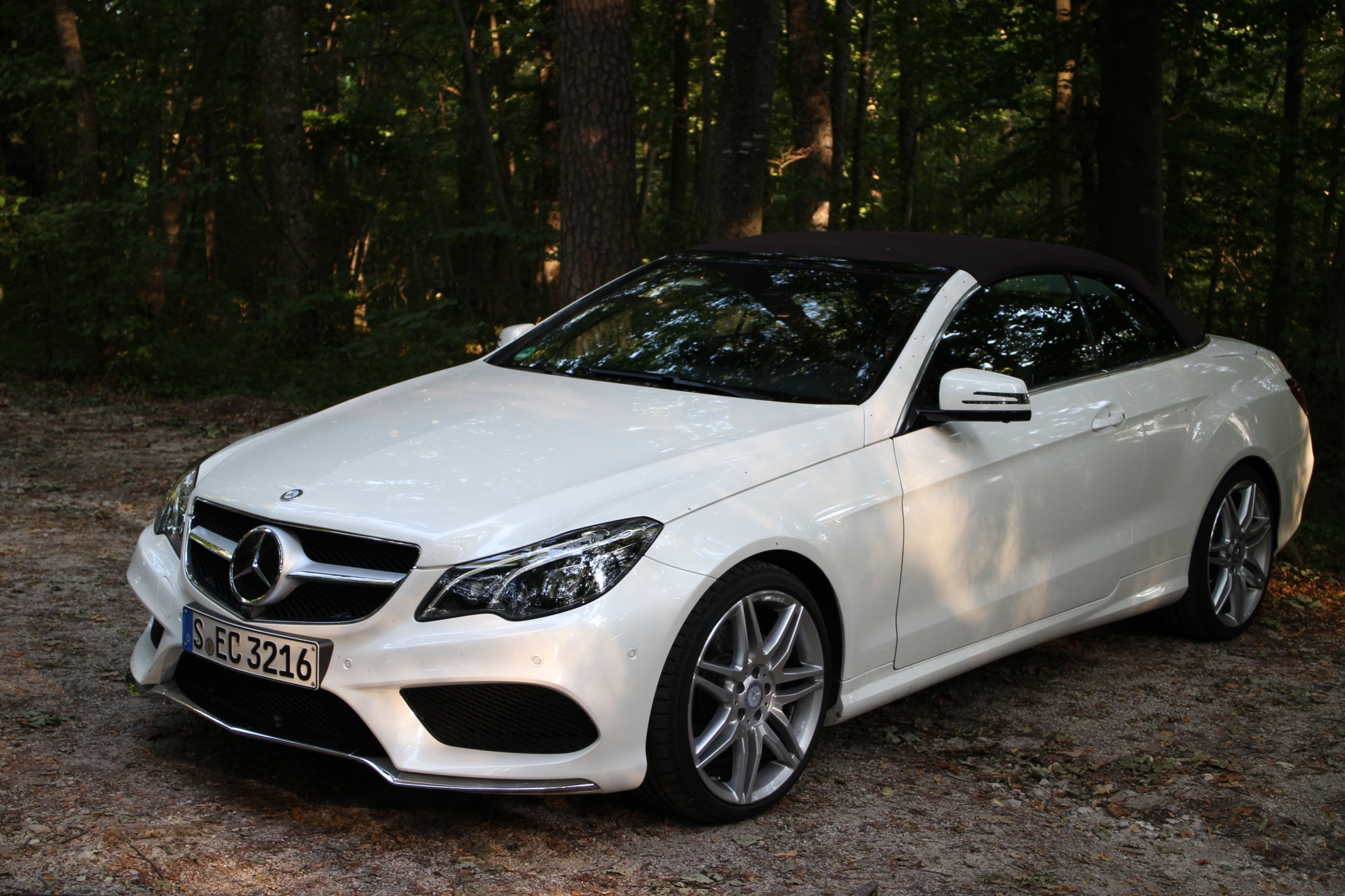 Mercedes E-Klasse Cabrio 2013